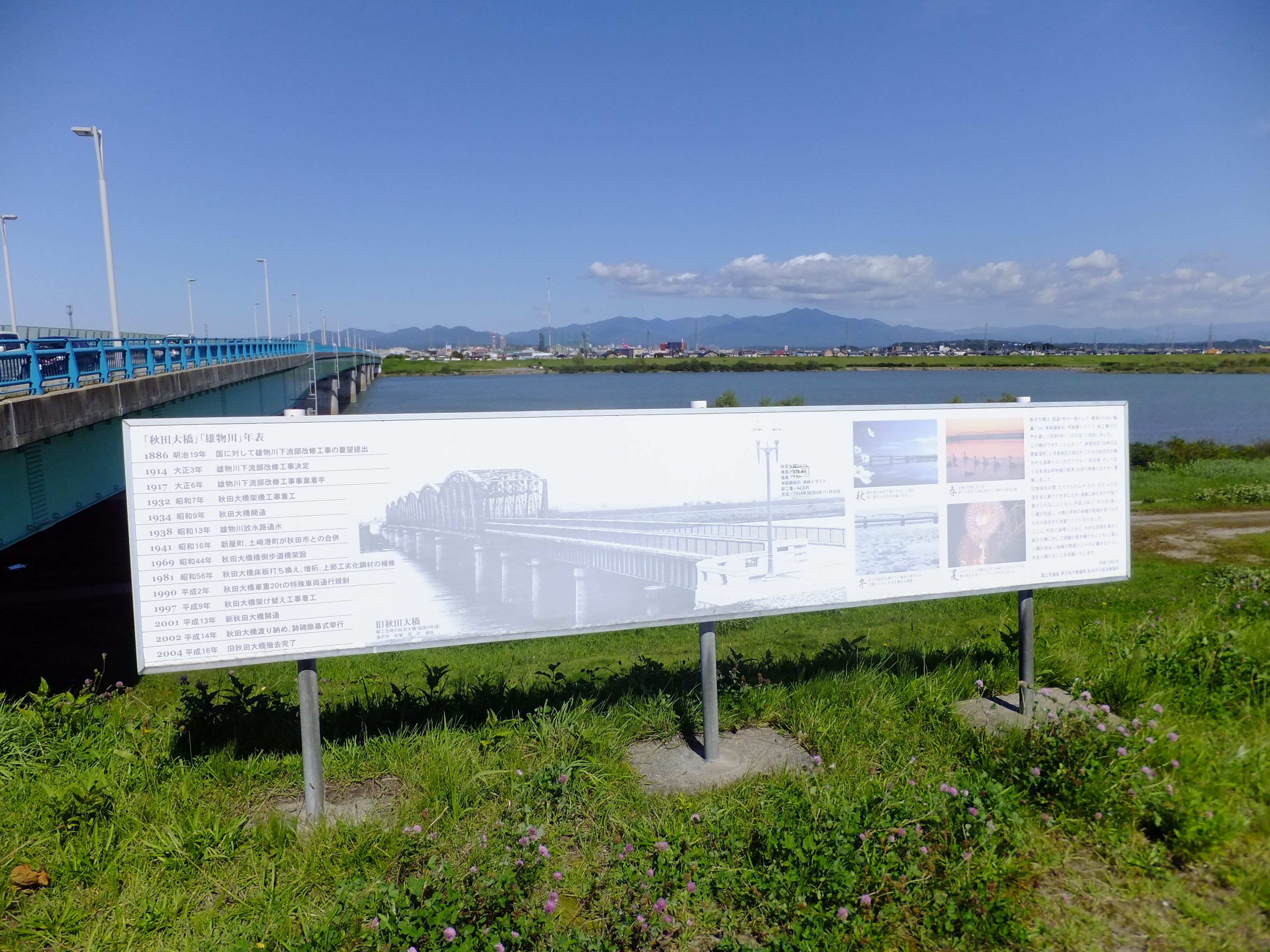 秋田大橋南岸にある旧橋の説明書き